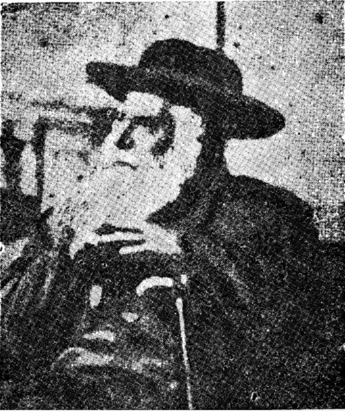 הרב יהושע הורוביץ